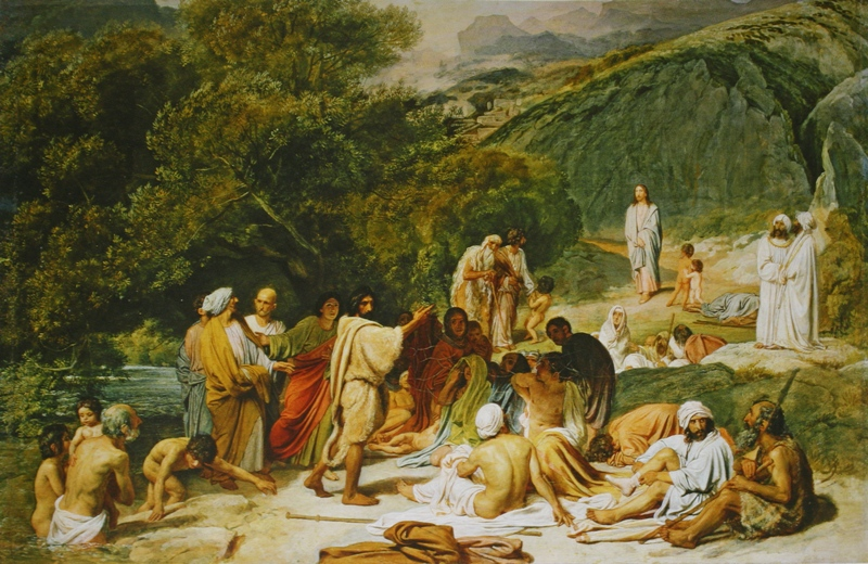 Иванов Александр Андреевич. Явление Христа народу. Первоначальный эскиз картины.